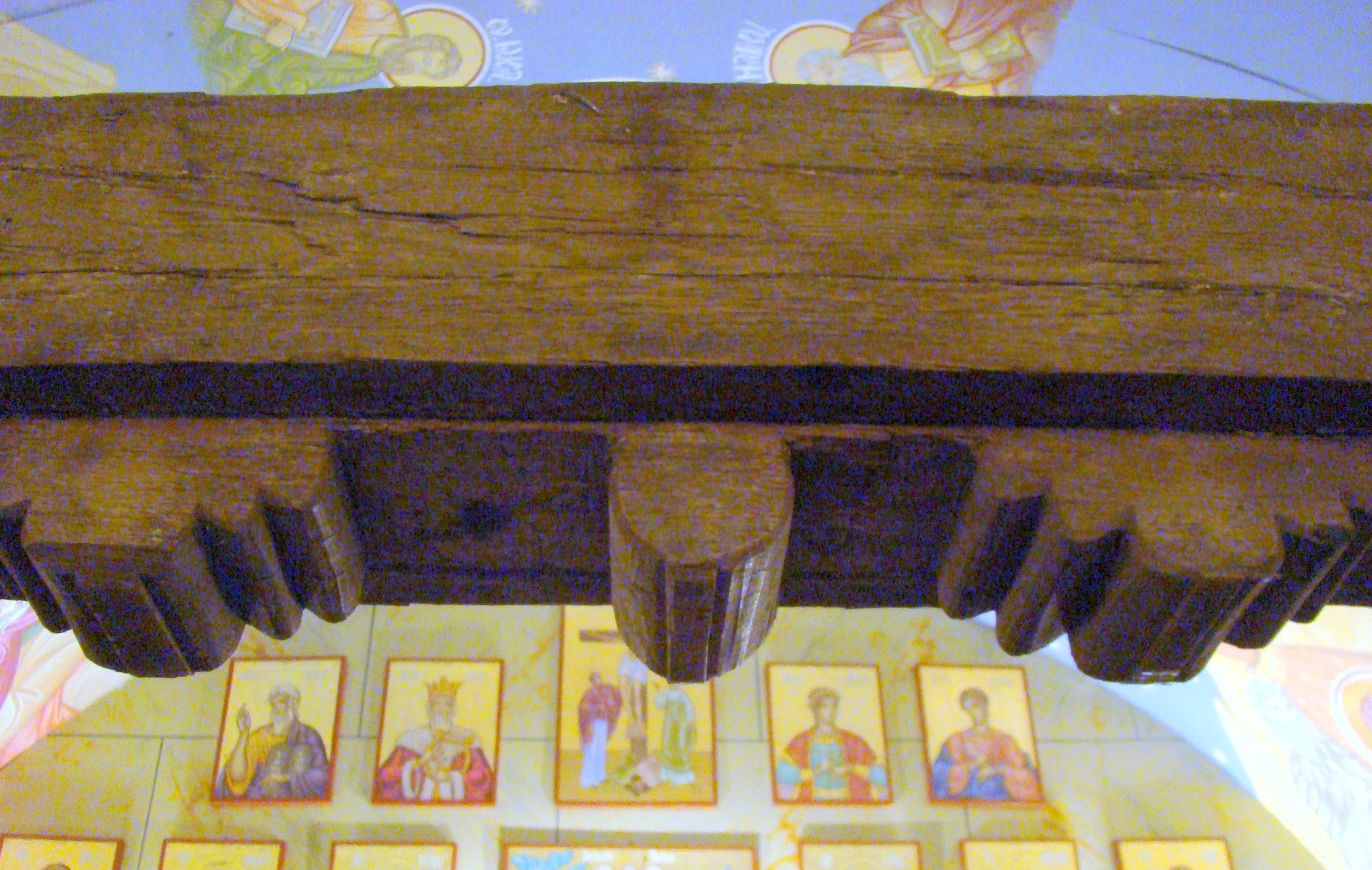 Biserica de lemn „Sf. Teodor Tiron" din Brătești, județul Bihor